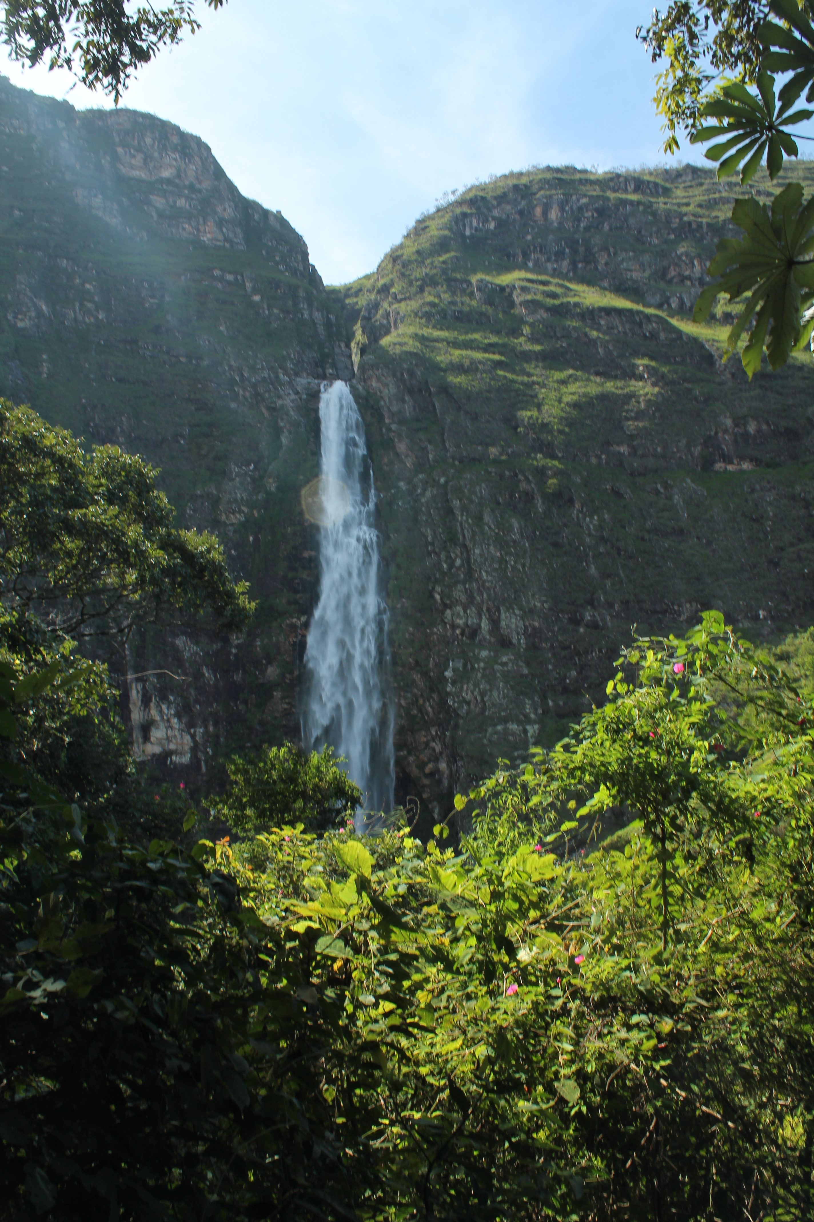 Casca D'ántas